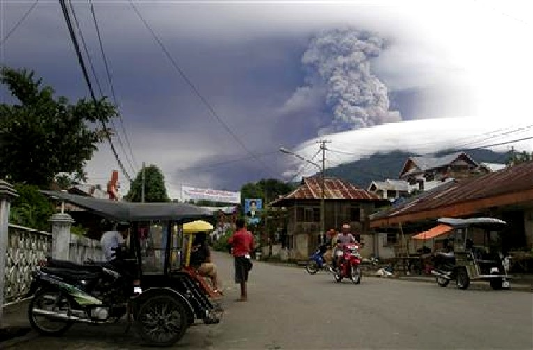 eruption of Soputan, Indonesia. 7 Juny 2008